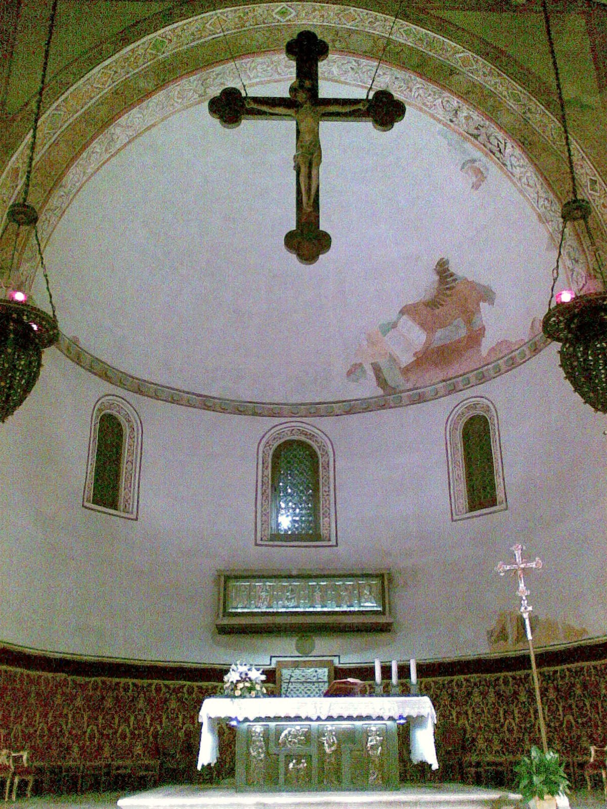 Foto scattata da me medesimo. Rilascio i diritti d'autore.